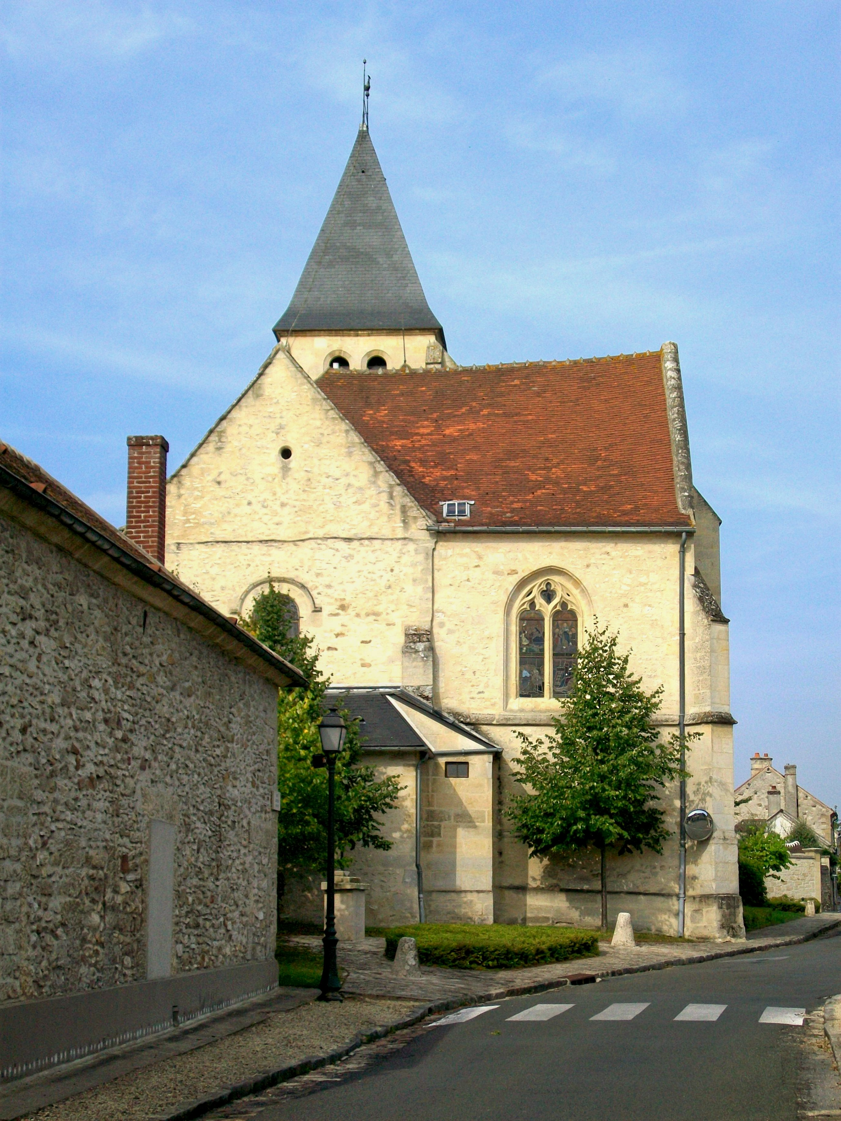 L'église Saint-Martin, façade orientale, rue Louis-Wallon ; vue depuis la rue Aristide-Briand.